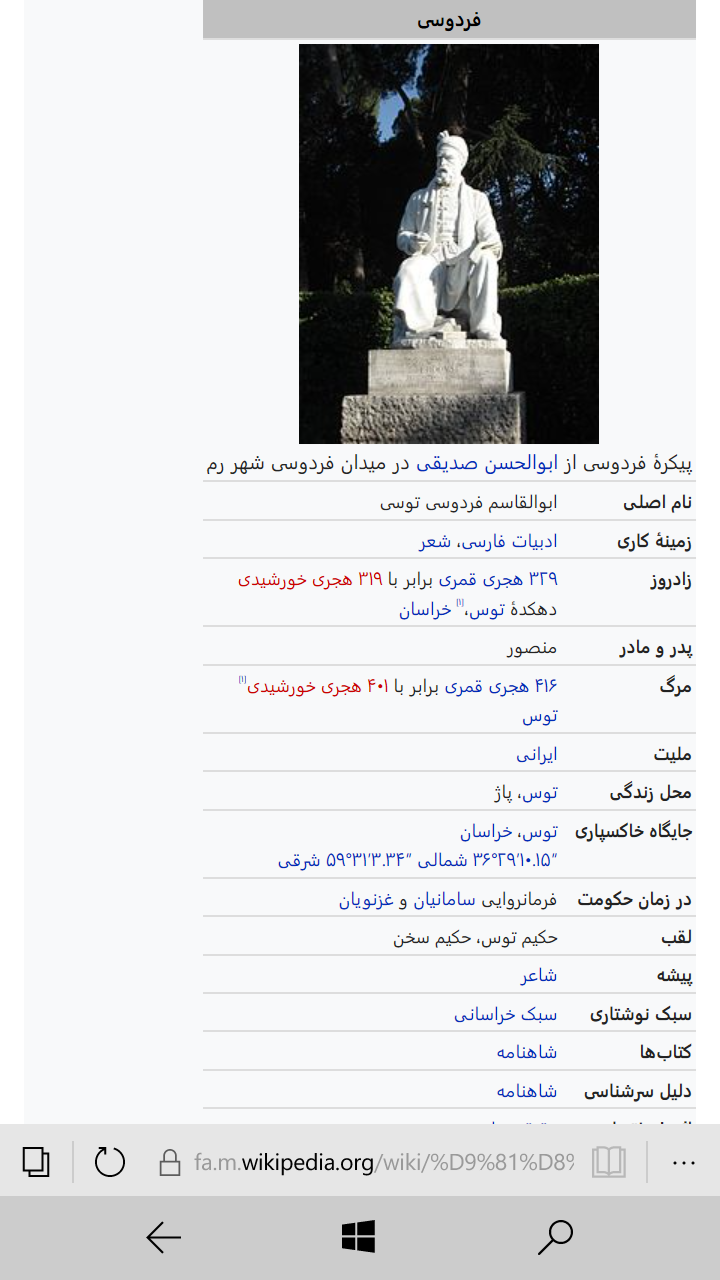 نماگرفت از مایکروسافت اج در سیستم عامل ویندوز 10 موبایل